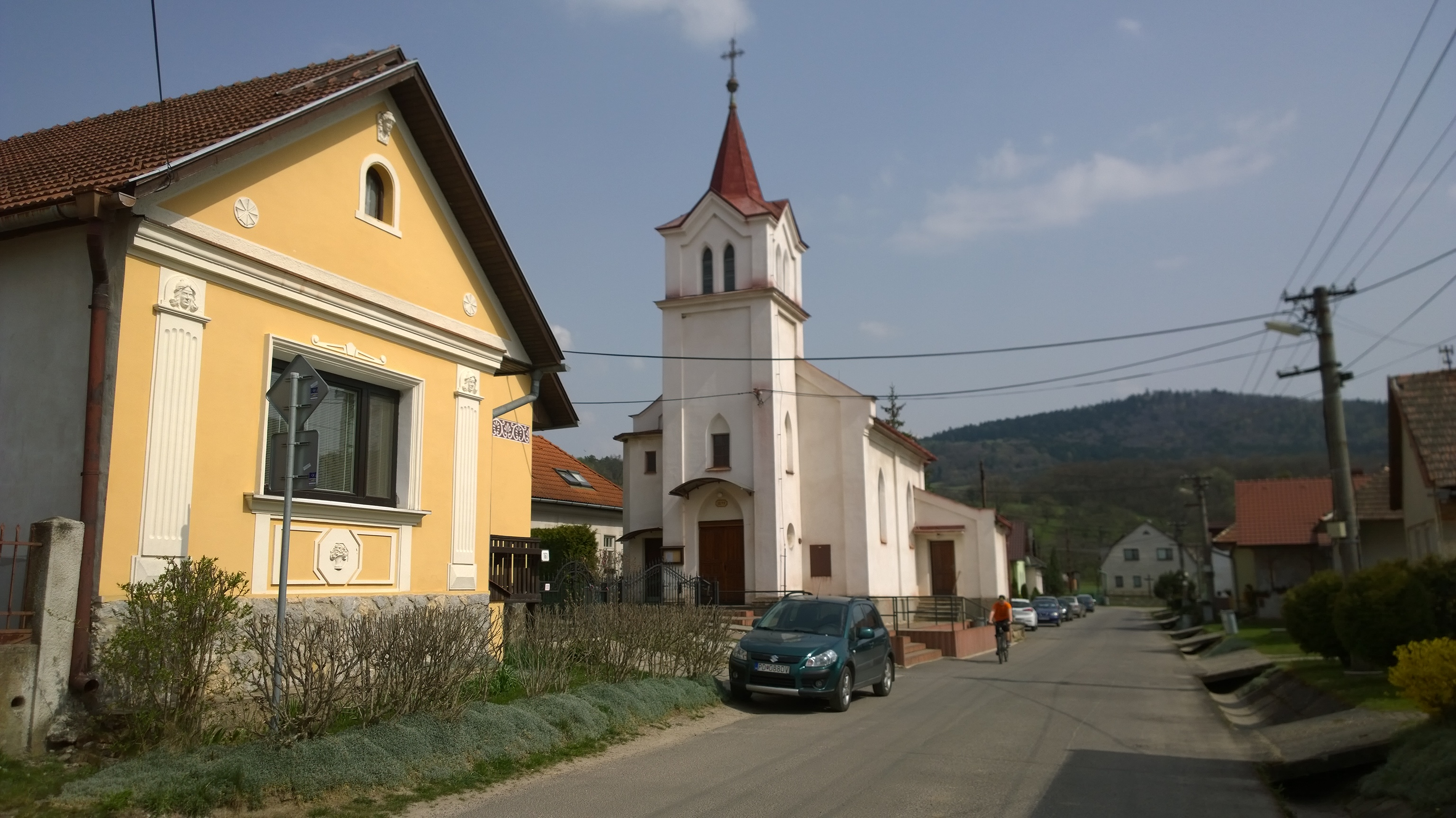 Pravenec, časť dedina